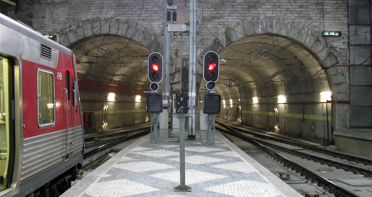 Inicio do Túnel do Rossio